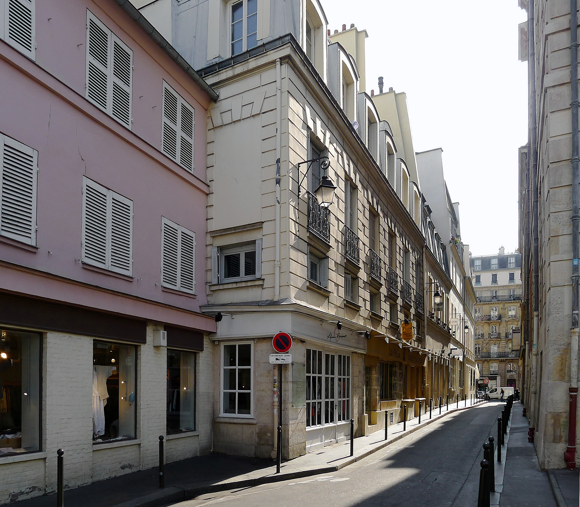 Passage de la Petite-Boucherie - Paris VI